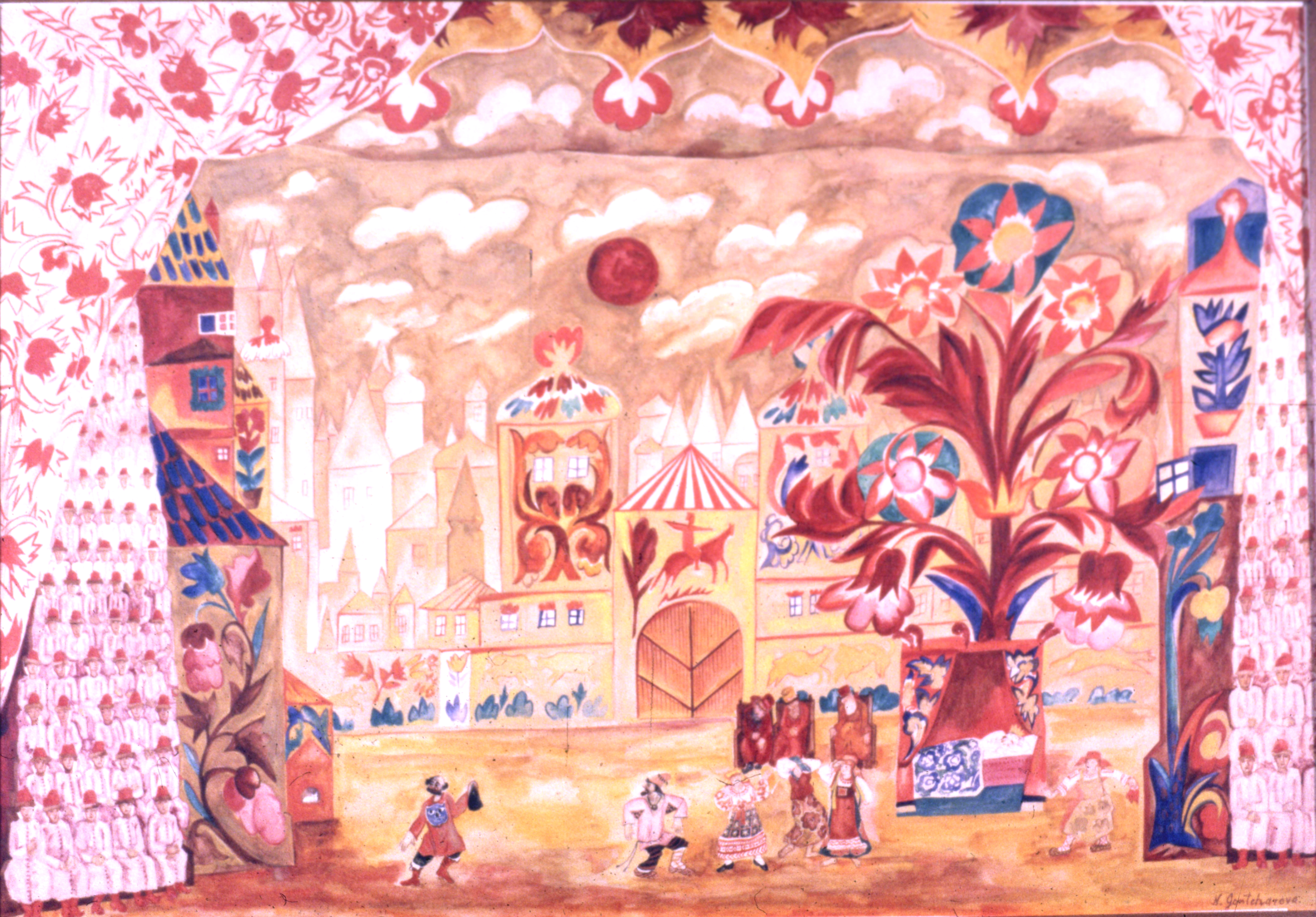 Эскиз декораций к опере Н. А. Римского-Корсакова "Золотой петушок". Антреприза С. П.Дягилева. 1914.